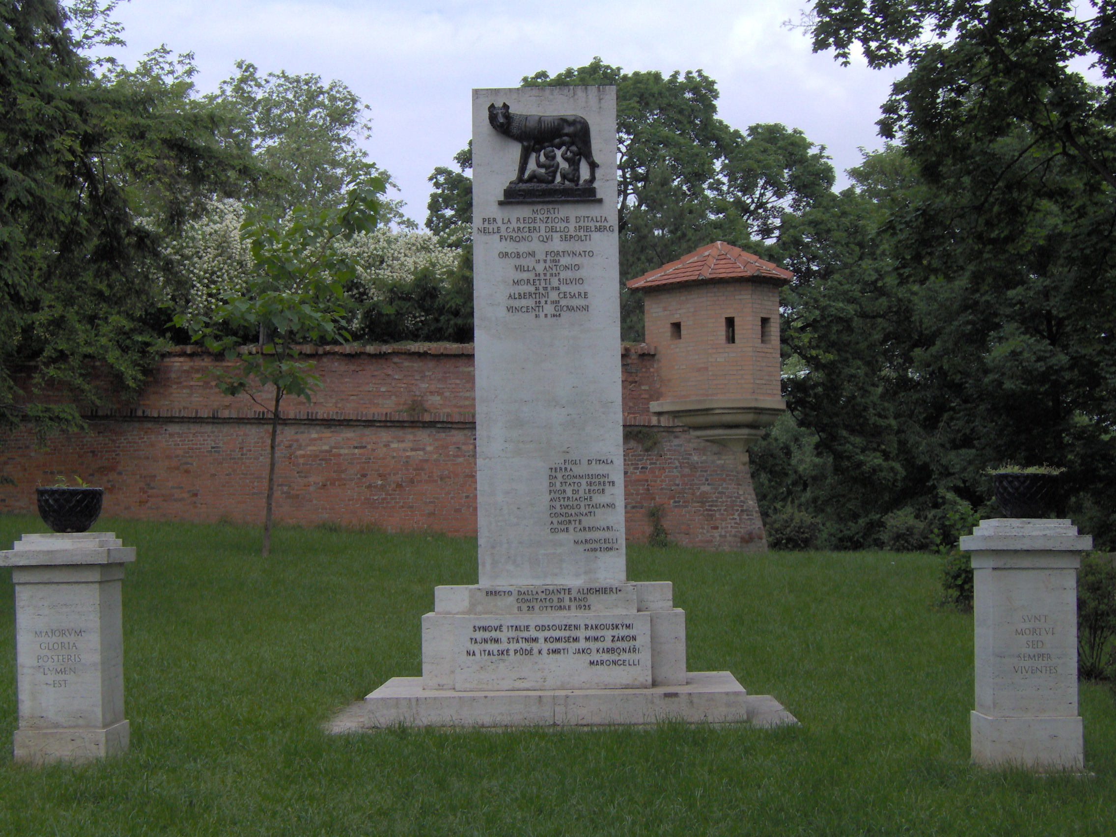 Pomník Italských karbonářů na svahu pod Špilberkem